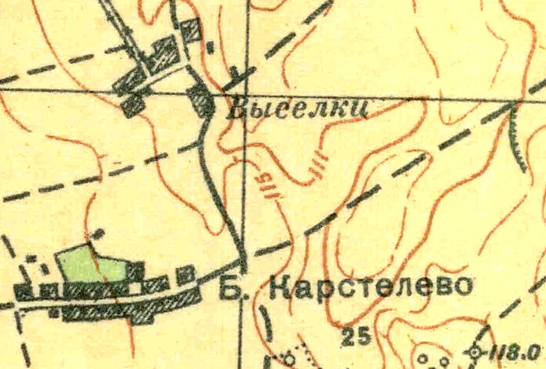 Топографическая карта Ленинградской области, квадрат О-35-24-Б-г (Б. Борницы), деревня Карстолово